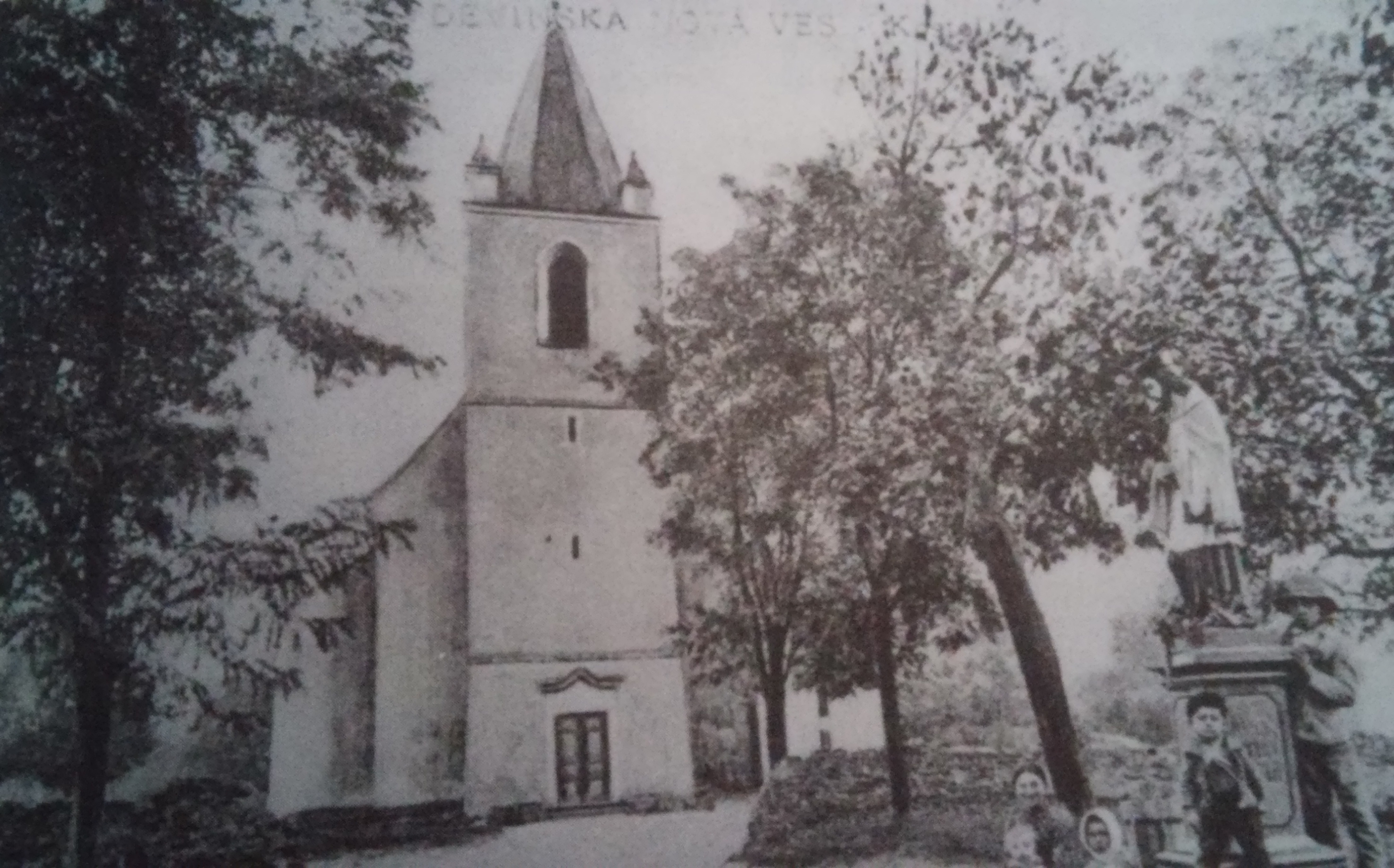 Kostol v DNV - historická foto